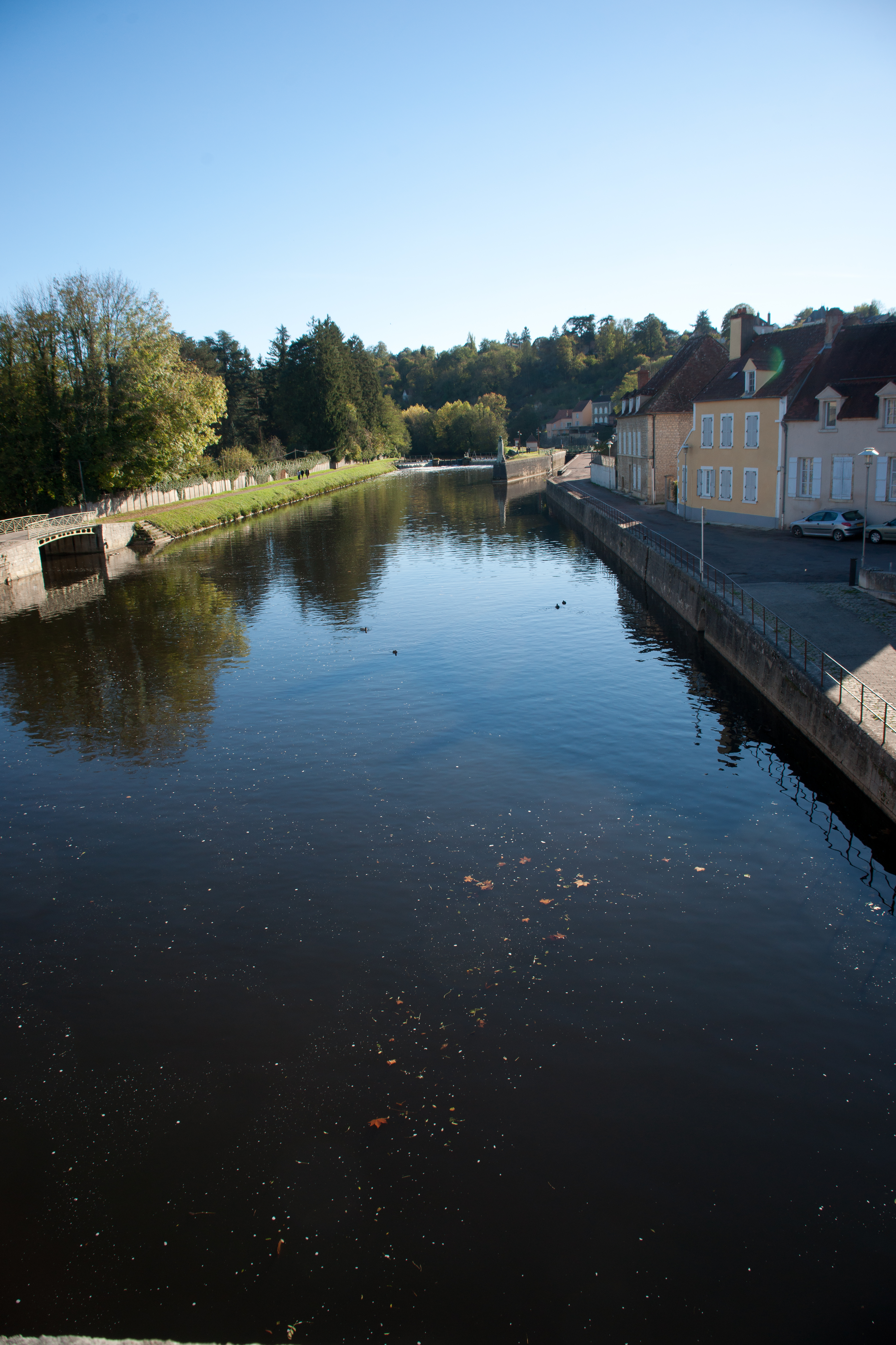 Clamecy - l'Yonne